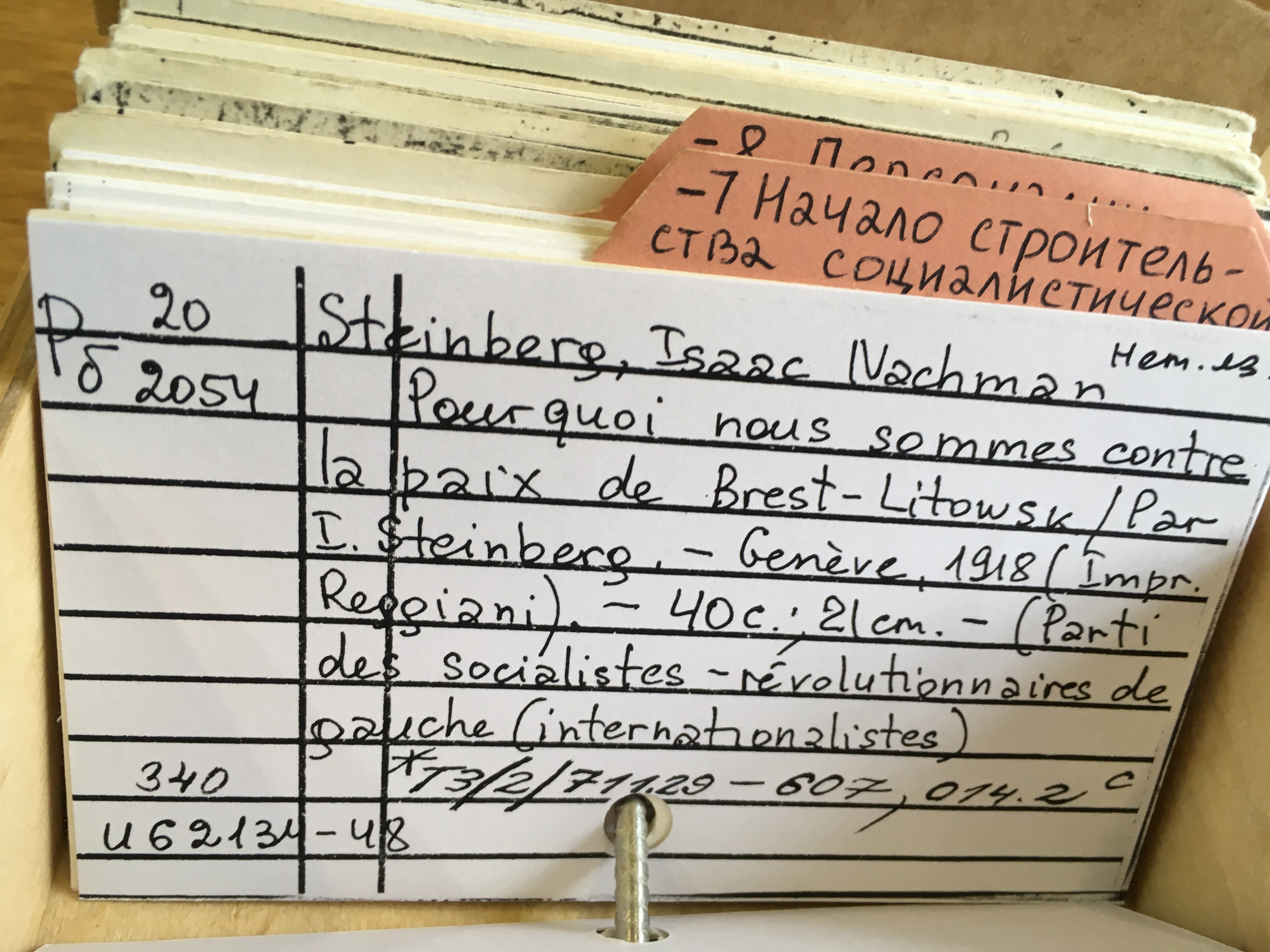 Историография Брестского мира: часть библиотечного каталога РГБ (Москва)